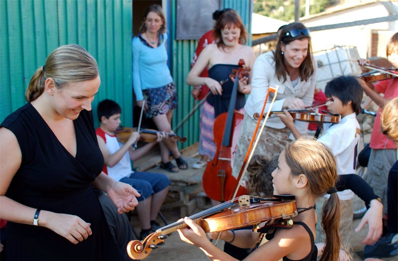 Salut Salon 2010 beim Besuch in ihrer Paten-Schule, der Escuela Popular de Artes im Armenviertel Achupallas von Viña del Mar (Chile)